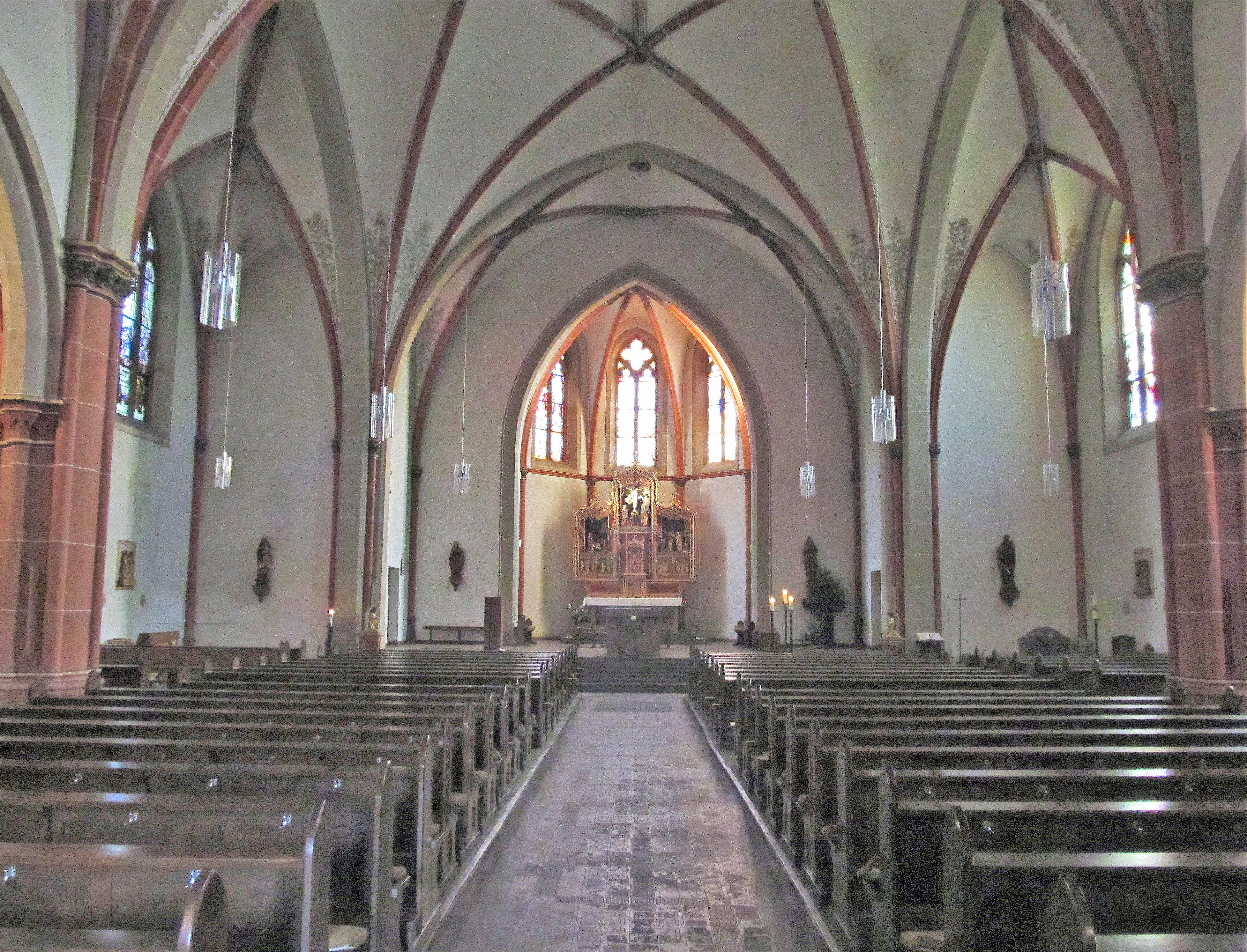 Blick ins Innere der katholischen Pfarrkirche Mariä Himmelfahrt in Geislautern, einem Stadtteil von Völklingen, Saarland